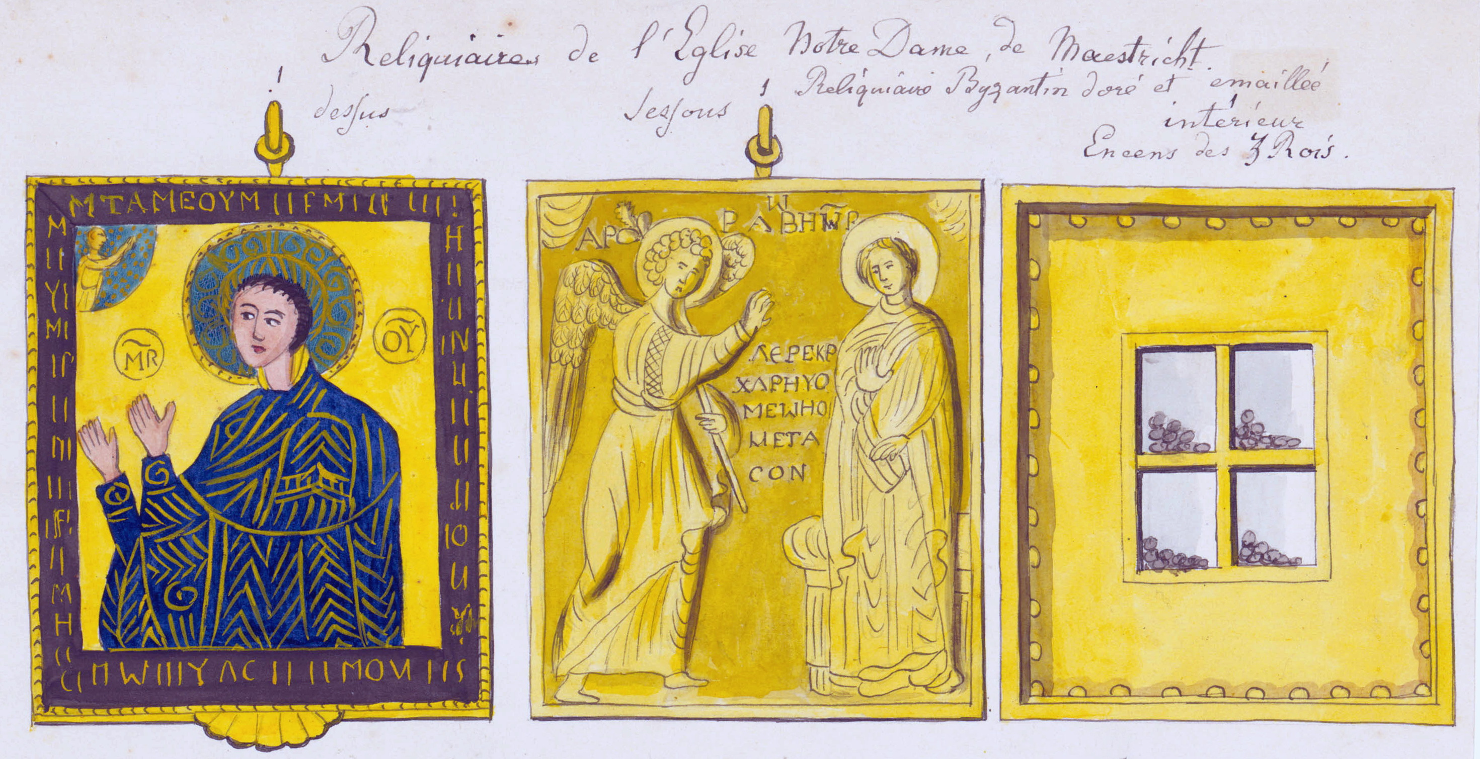 Tekening van Philippe van Gulpen van een triptiekje en reliekhouders in de Schatkamer van de Onze-Lieve-Vrouwekerk in Maastricht. Tekst: "Reliquiaires de l’Eglise Notre Dame de Maestricht (...)". Collectie van der Noordaa in het RHCL, Maastricht, CVDN 20.